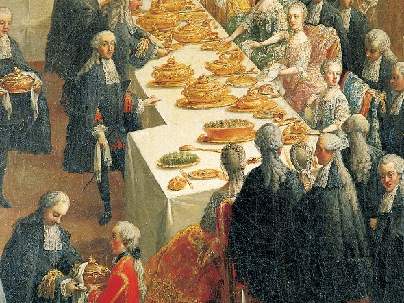 Werkstatt des Hofmalers Martin van Meytens: Hoftafel in der Großen Antecamera der Hofburg, Ölgemälde, nach 1760, mit Kaisersemmel, befindet sich in Schloss Schönbrunn,Ausschnitt